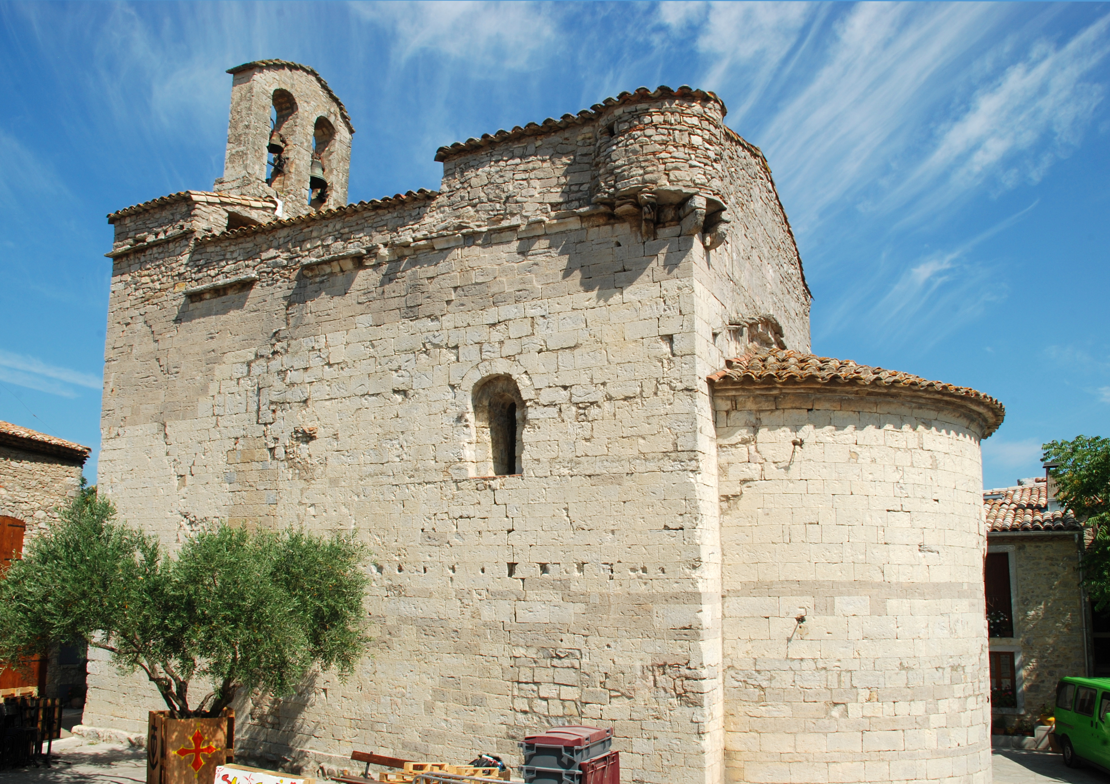 France - Languedoc - Église de Sainte-Croix-de-Quintillargues